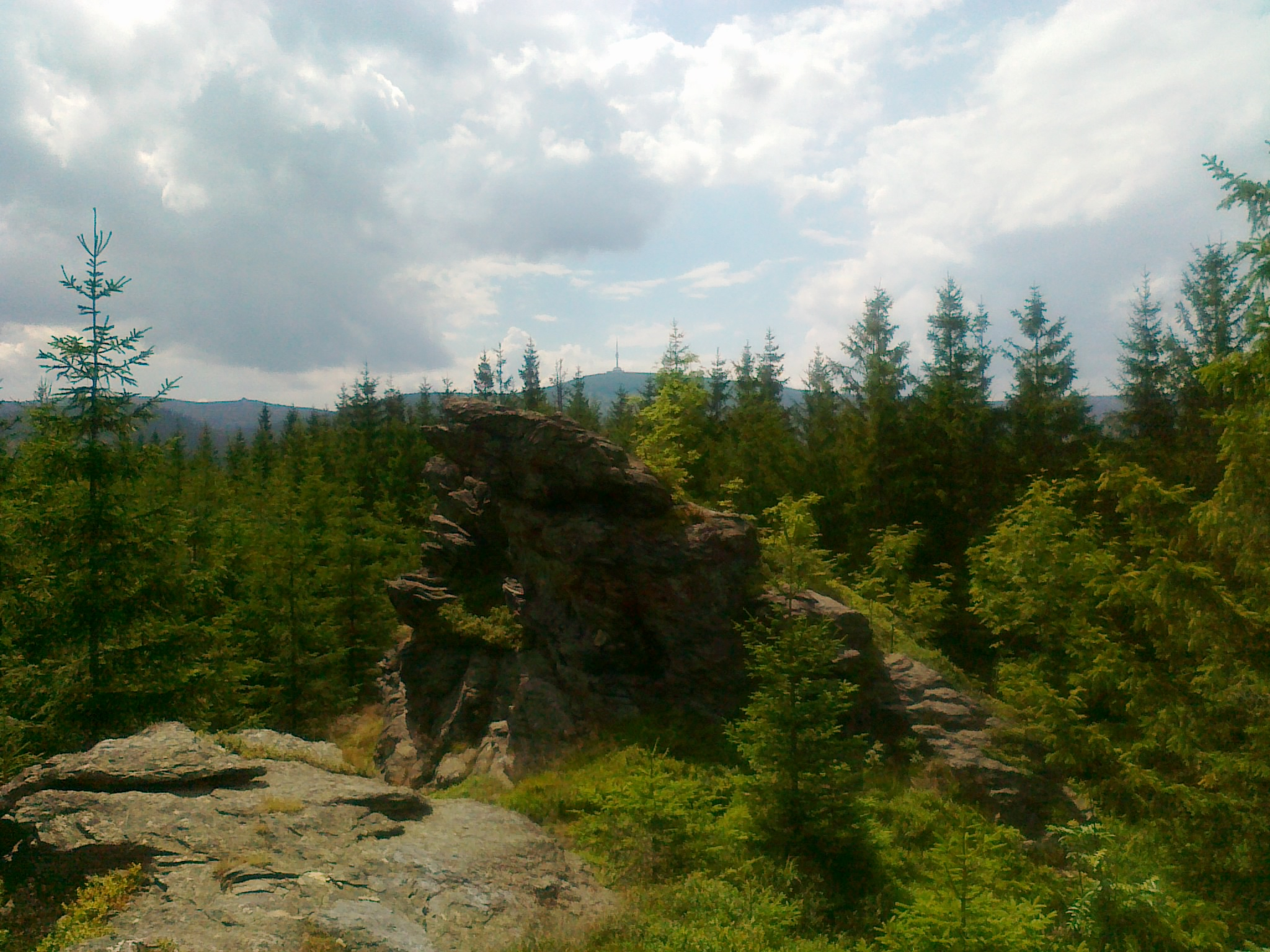 Widok ze szczytowego skaliska Lyry na szczyty gór Petrovy kameny - 1446 m i Praděd - 1491 m